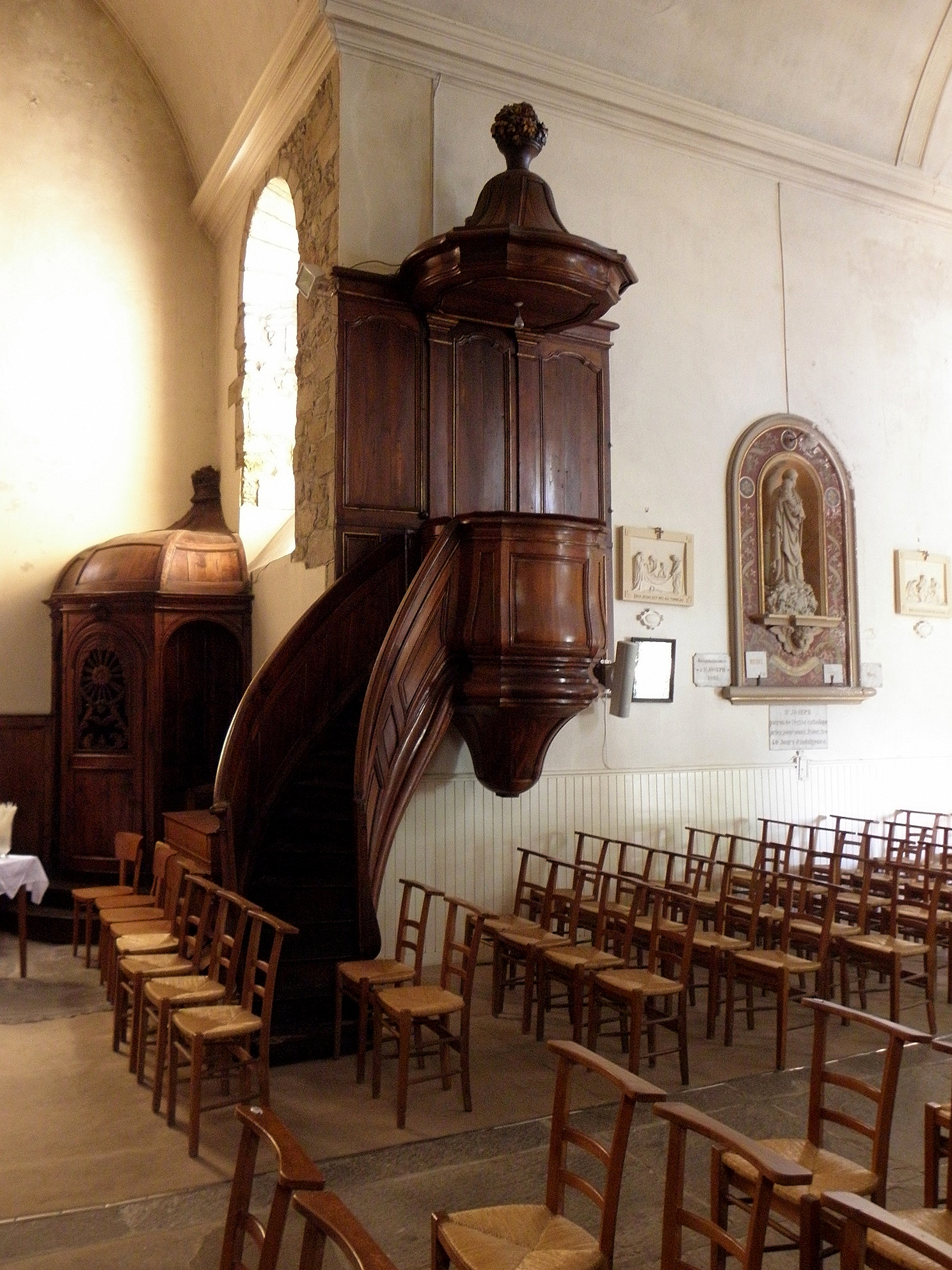 Intérieur de l'église Notre-Dame-de-l'Assomption de La Gouesnière (35). La chaire.